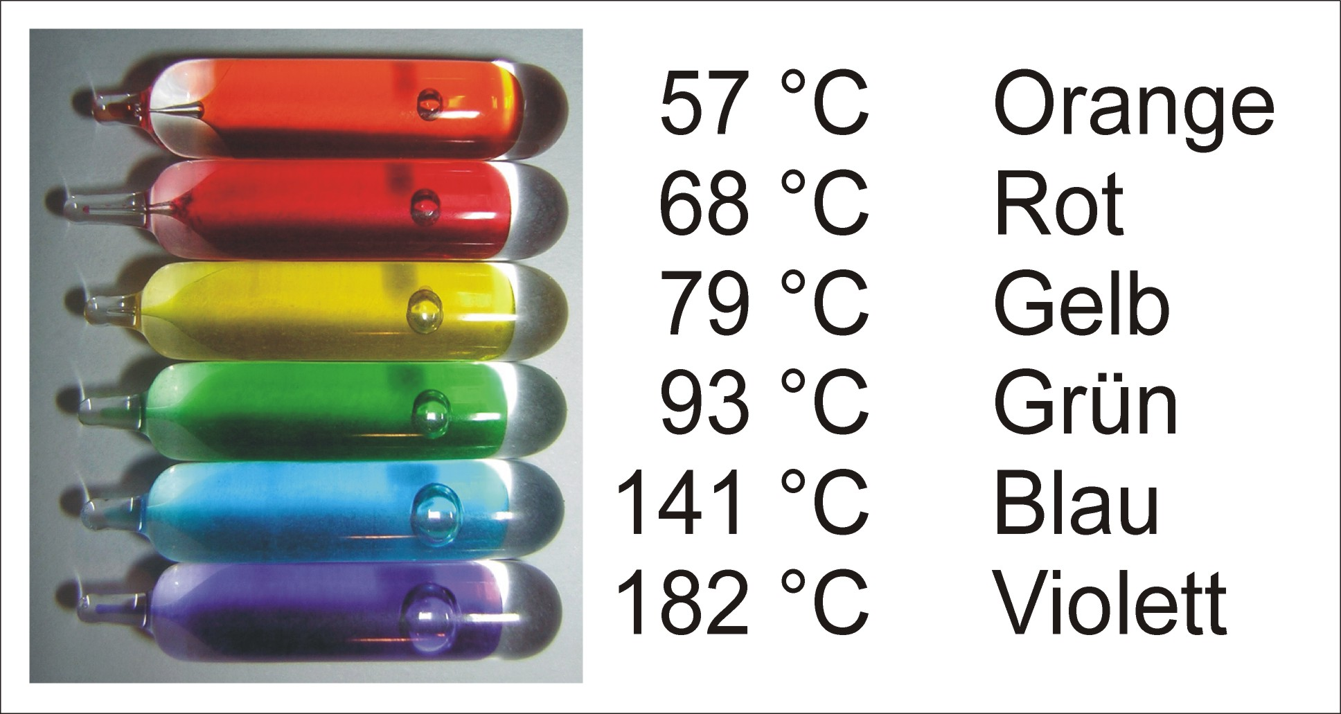 Sprinklerampullen versch. Farben mit Temperaturangaben